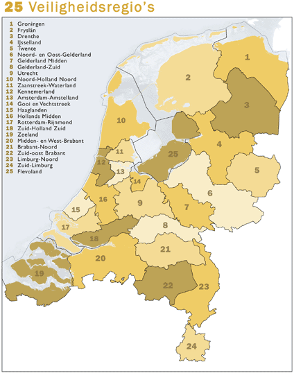 25 Veiligheidsregio's, status 2008. Samengesteld door Jan-Willem van Aalst uit publiek beschikbare geo-data: Referentie-ondergrond op water bewerkt vanuit Gebruik is vrij met bronvermelding NLR en ESA. Vectorgrenzen van gemeenten en regio's vrij ter beschikking gesteld met dank aan cartografen van brandweerregio's Hollands-Midden en IJssel-Vecht; gerasterd in Photoshop.